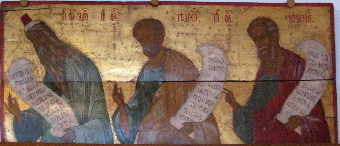 Пророческий ряд. Около 1502 года. Из Собора Рождества Богородицы в Ферапонтовом монастыре. Музей Кирилло-Белозерского Монастыря. 1. Пророки Софония, Аввакум, Иона, Моисей. 2. Пророки Даниил, Иеремия, Исайя 3. Богоматерь Знамение, цари-пророки Давид и Соломон 4. Пророки Аарон, Гедеон, Иезекииль 5. Пророки Иаков, Захария, Малахия, Иоиль.